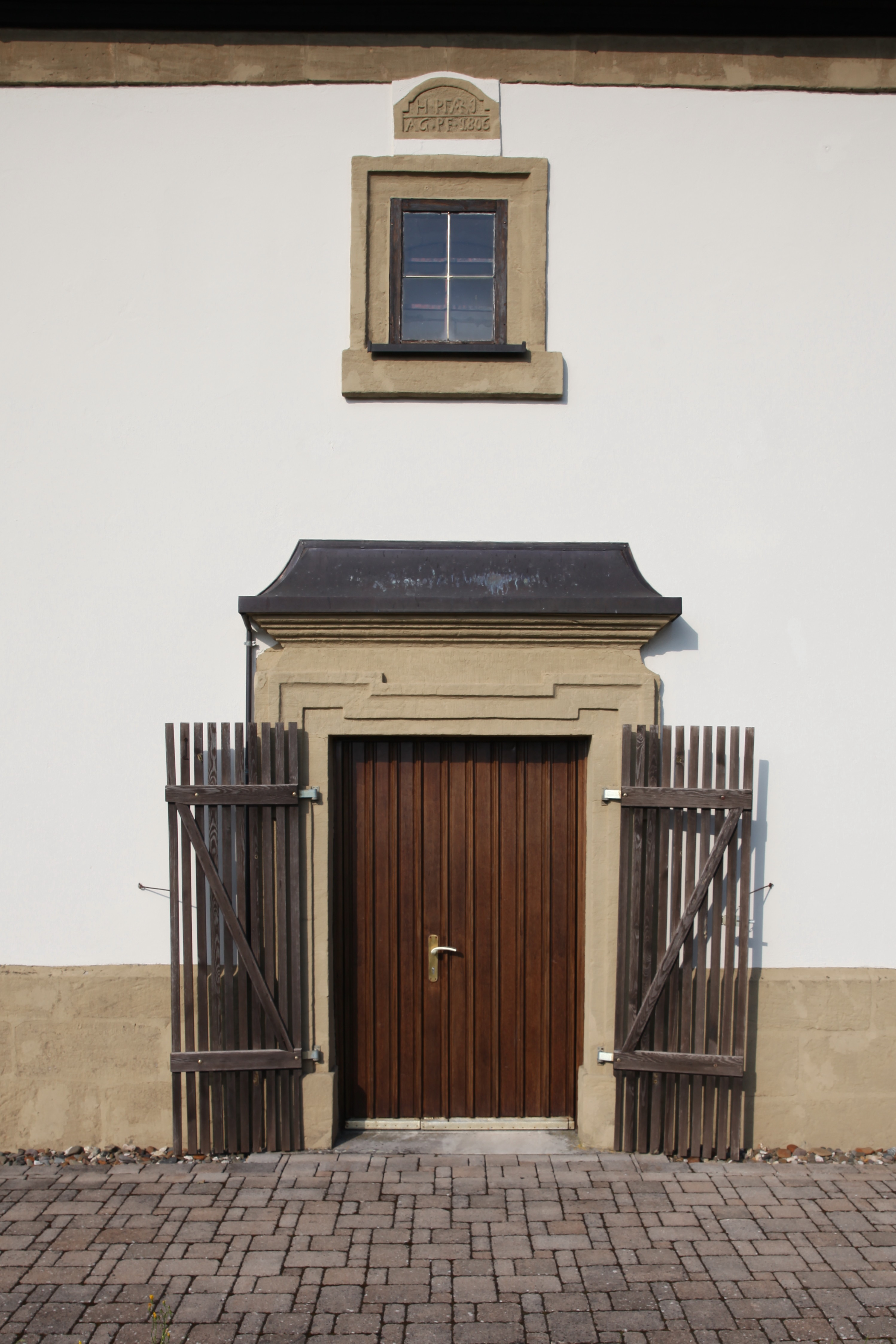 St. Antonius Eremita in Gleismuthhausen